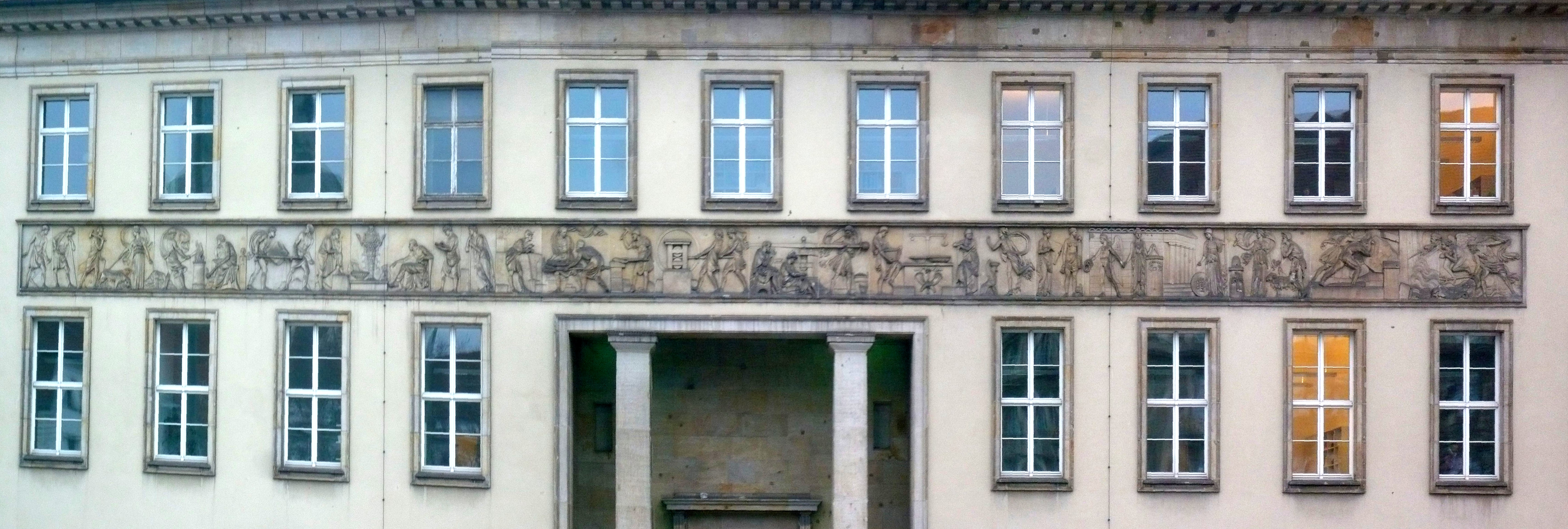 Ortsteil Mitte: Fassadenseite des Palais Schwerin am Mühlendamm